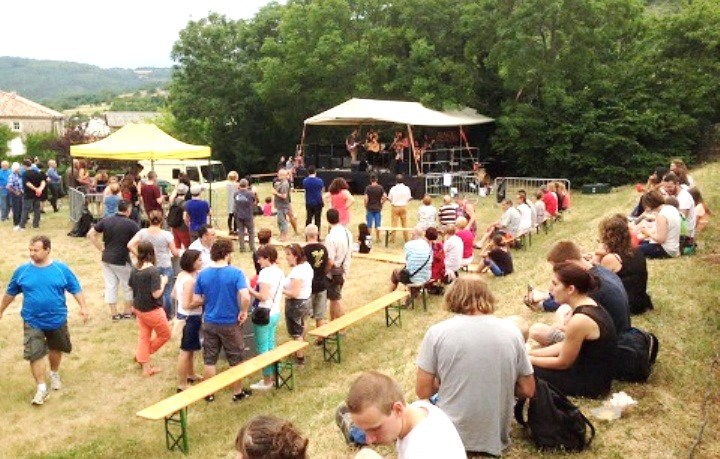 Vinzieux détail